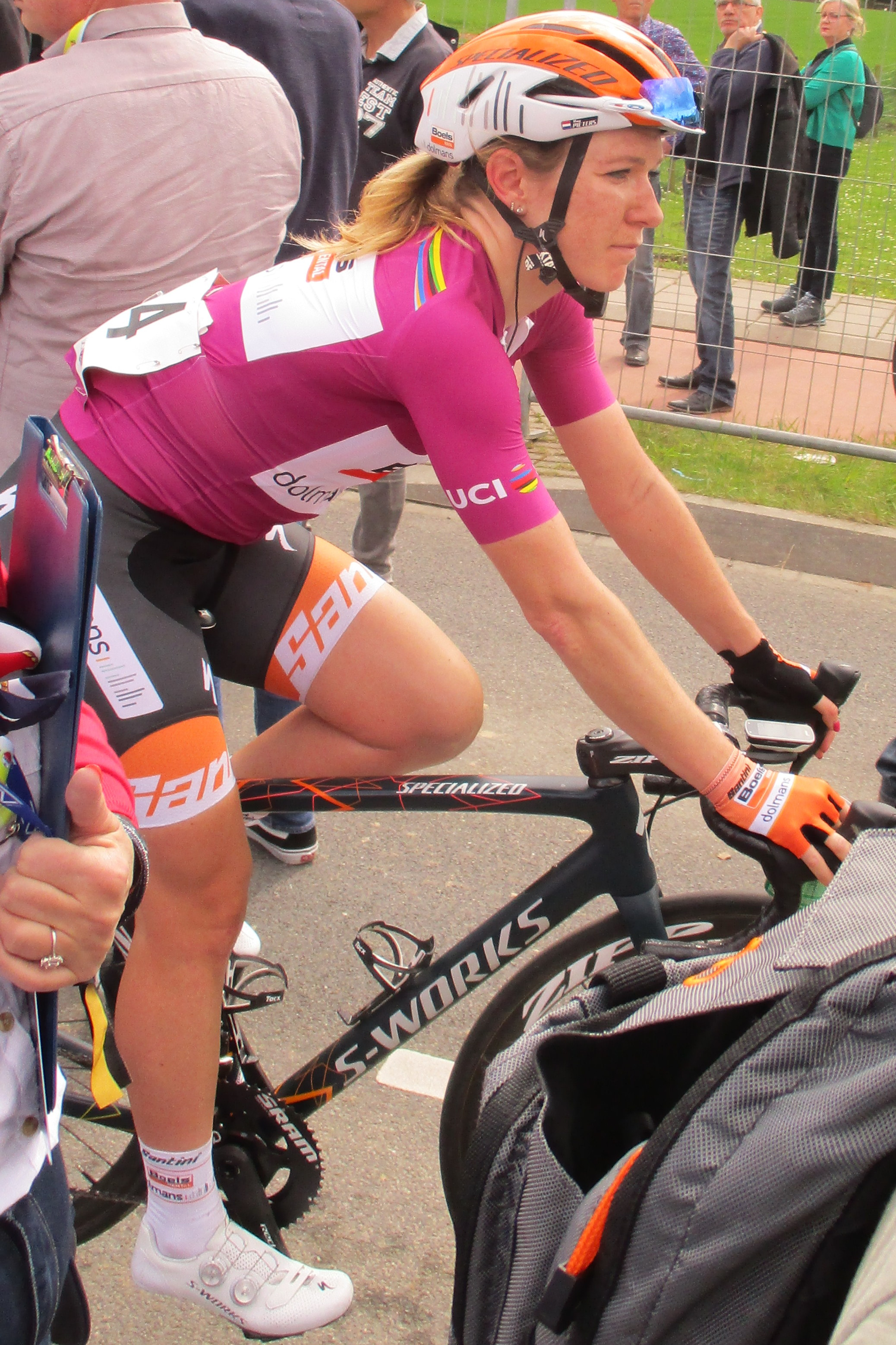 Finish van de Amstel Gold Race Ladies Edition 2018 in Berg, Valkenburg aan de Geul.